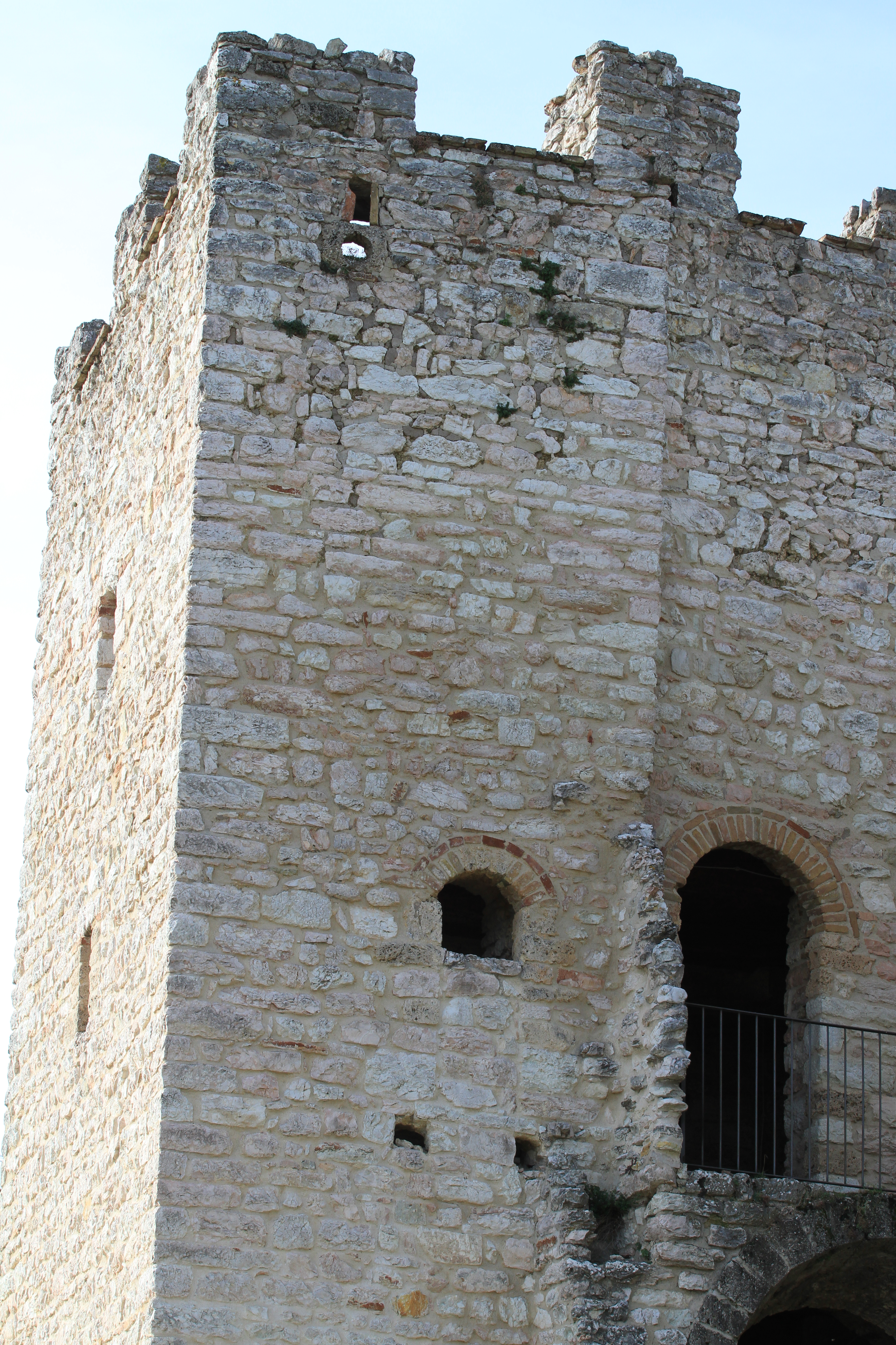 Montalto di Cessapalombo 2